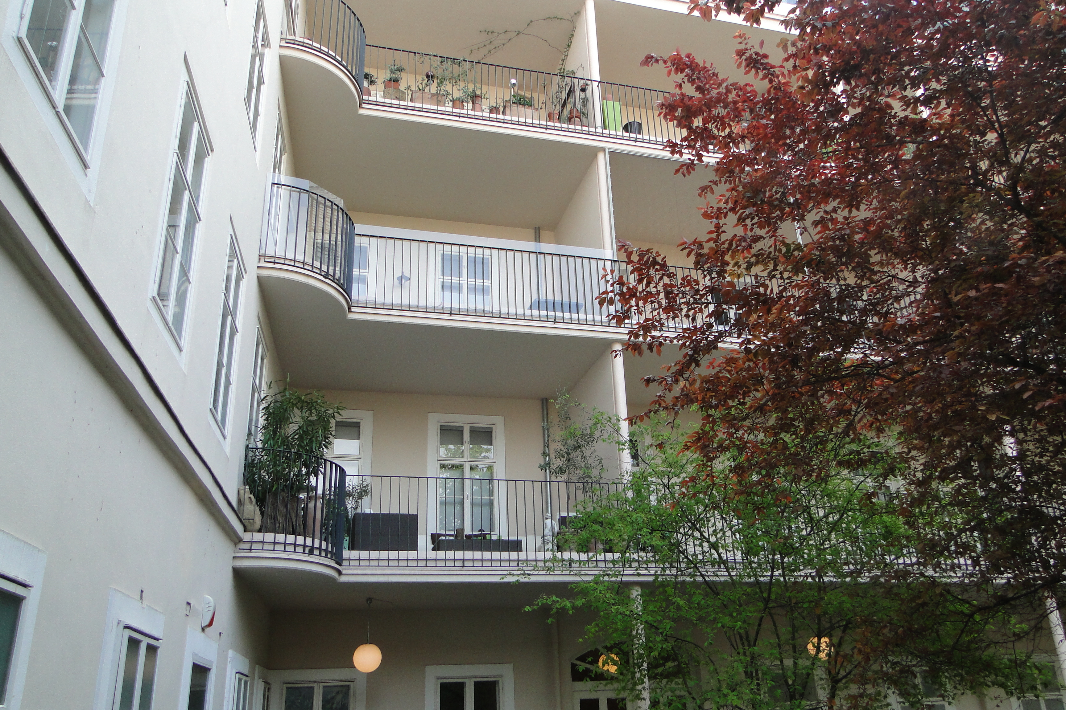 Währinger Straße 18, Wien. Hofseitige Loggien